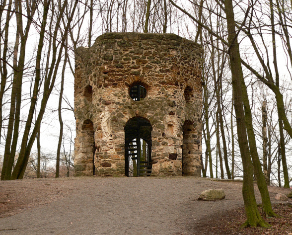 Hexenturm nahe Kloster Marienwerder bei Hannover